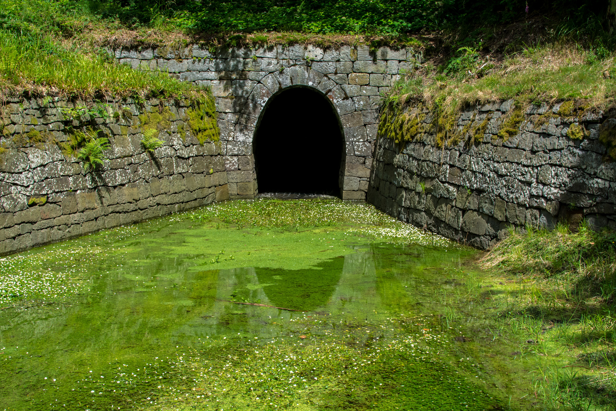 Die Huttaler Widerwaage HWN 128